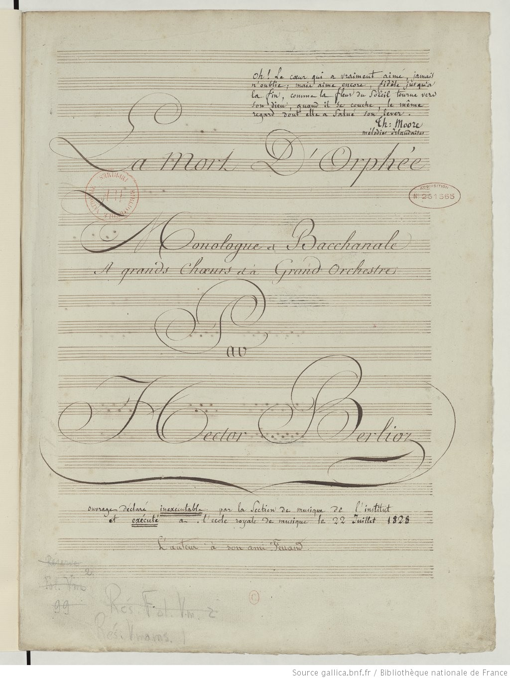 page de titre du manuscrit de "La mort d'Orphée" d'Hector Berlioz, cantate pour le prix de Rome, 1827